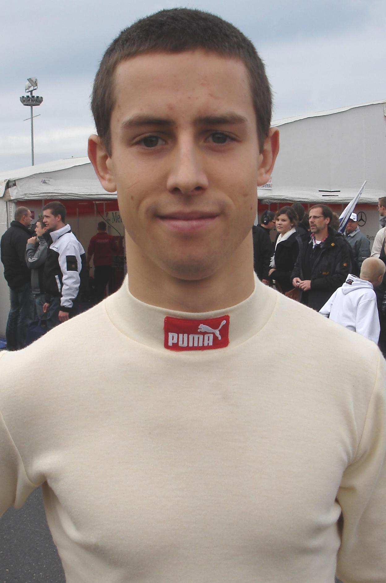 Alexander Sims während eines DTM-Rennwochenendes auf dem Hockenheimring